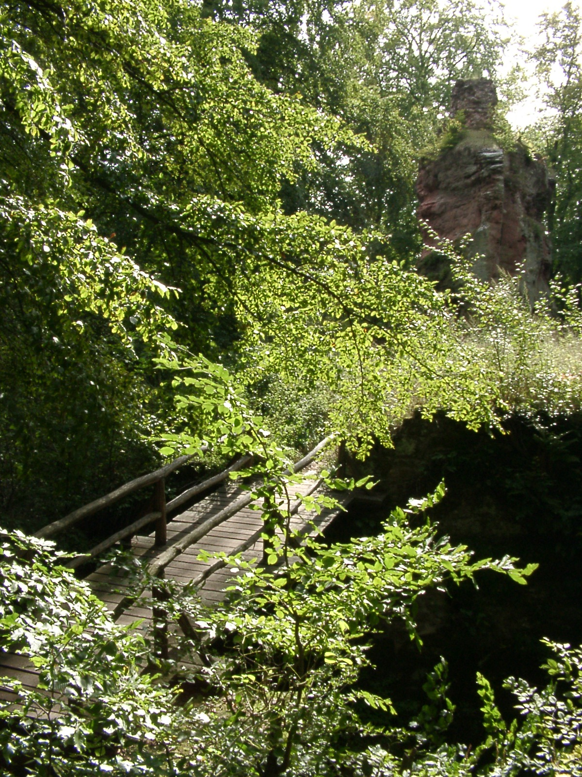 Burgruine Beilstein